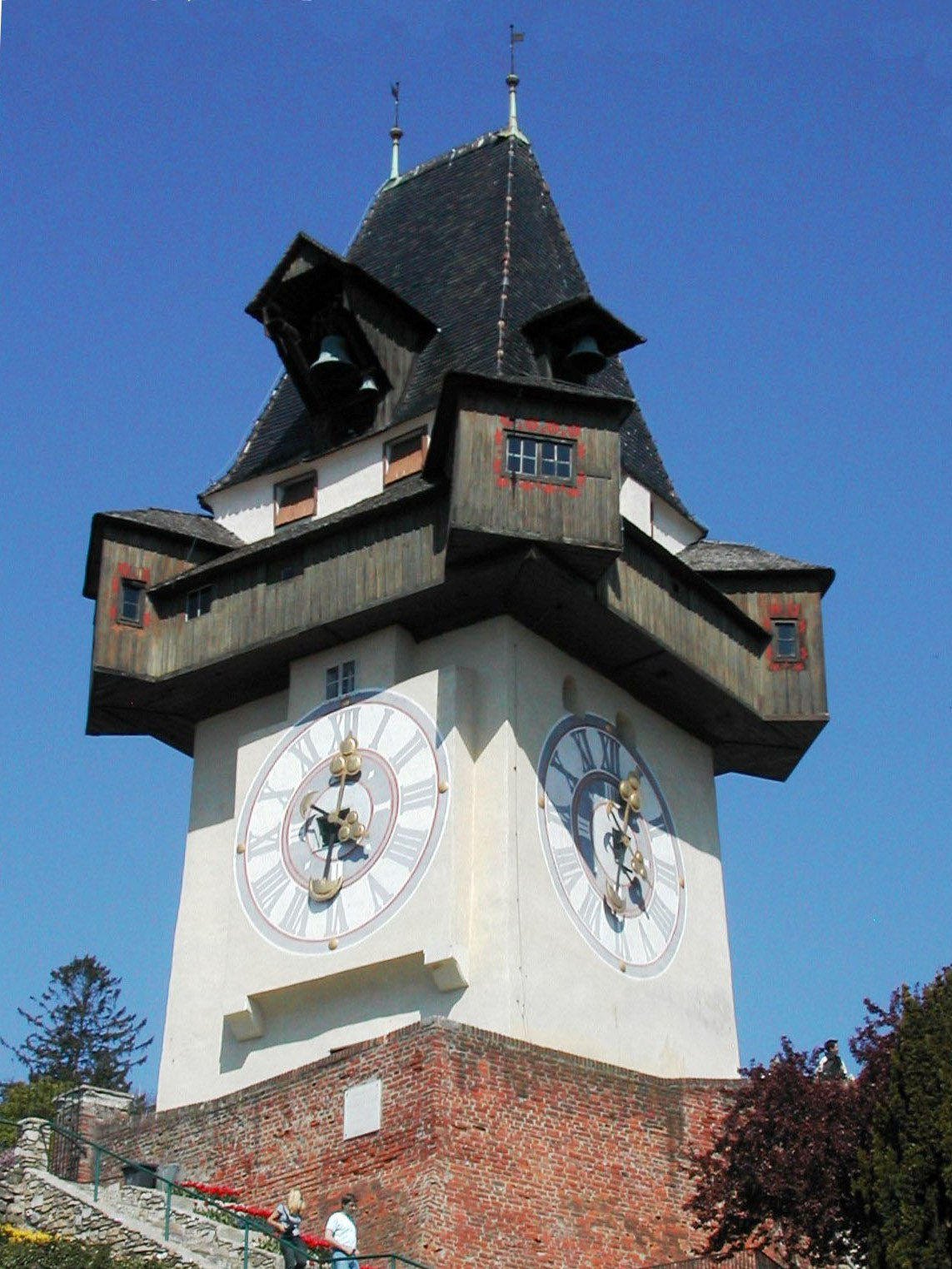 Grazer Uhrturm/Clocktower